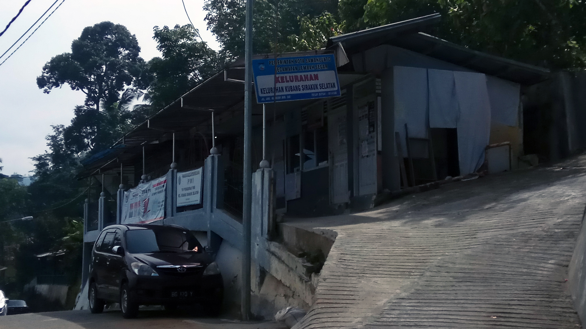 Kantor Lurah Kubang Sirakuak Selatan, Lembah Segar, Sawahlunto.